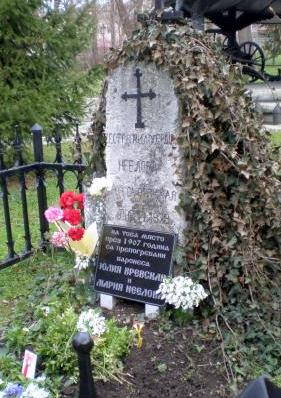 Надгробен паметник на баронеса Юлия Вревская и Мария Неелова, работили като милосърдни сестри през Руско-турската война 1877-1878 г. и препогребани на това място.